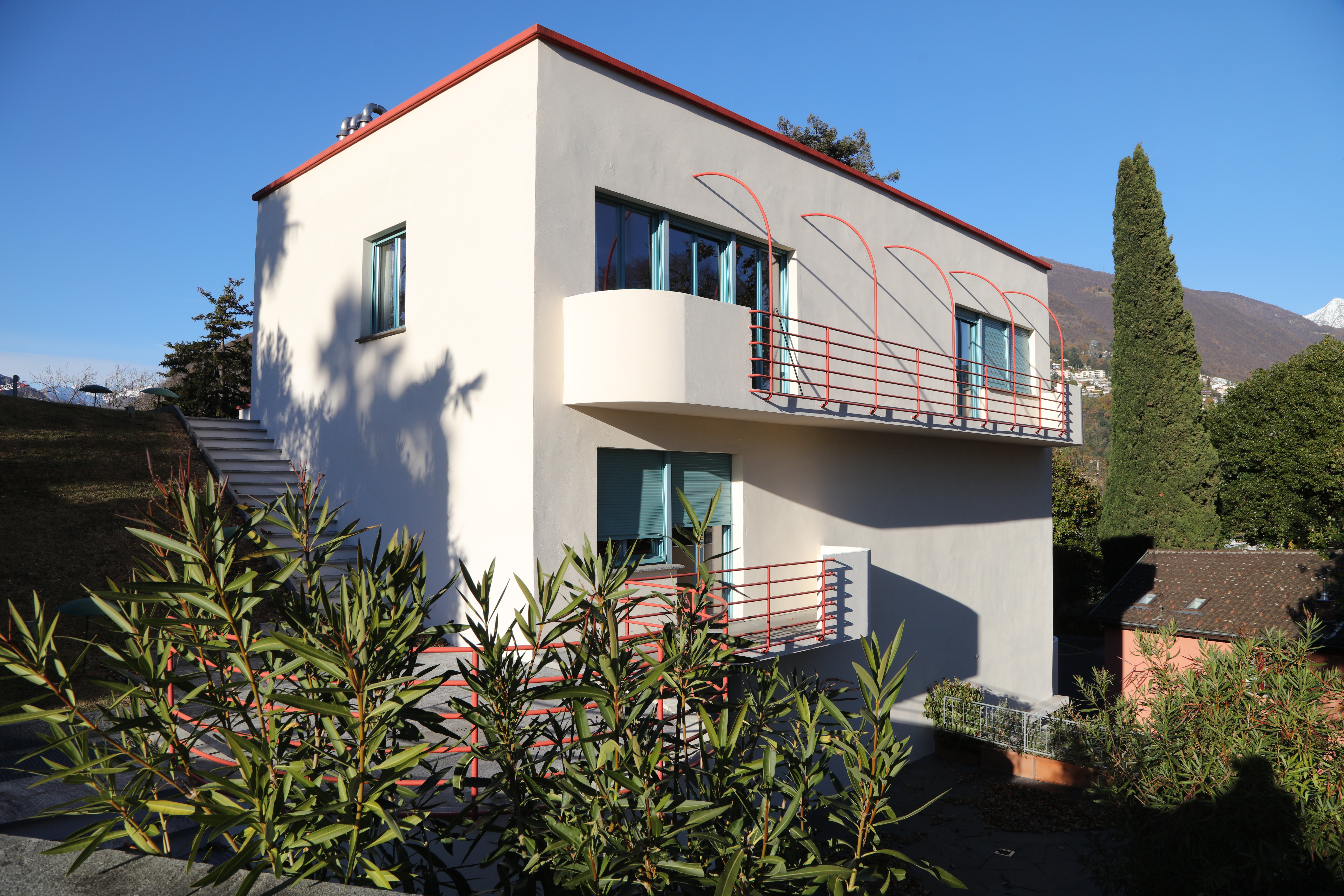 Das Teatro San Materno in Ascona, von Carl Weidemeyer erbaut